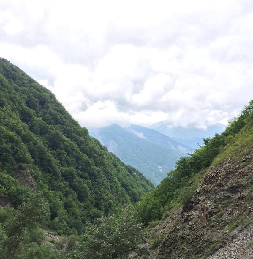 Qax dağ